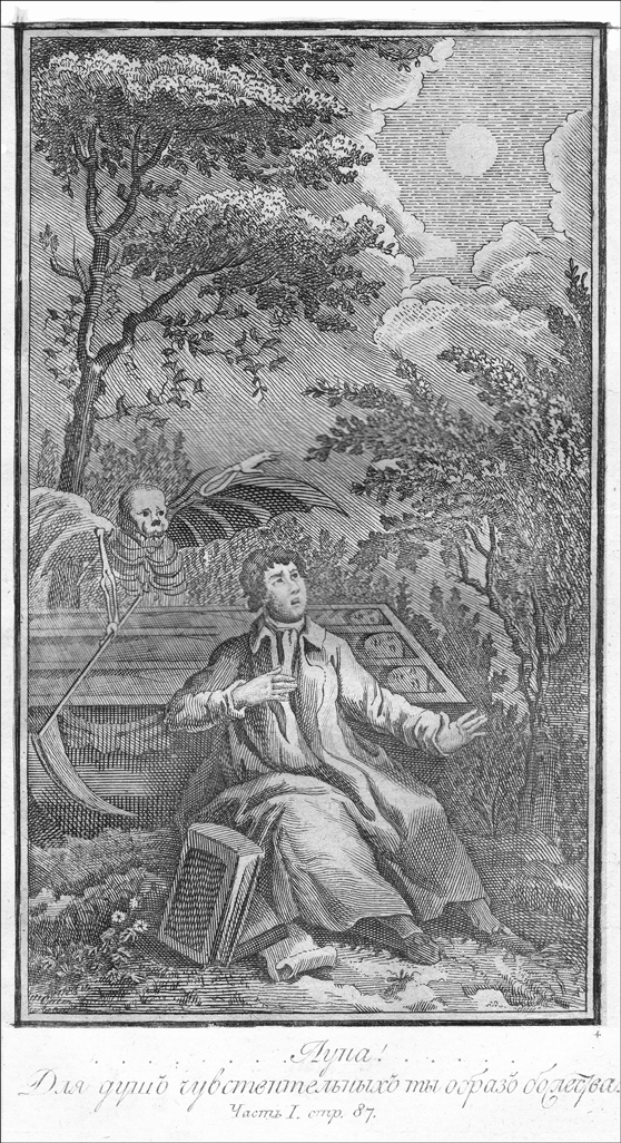 Гравюра из книги: "Плач, или Нощные размышления о жизни, смерти и бессмертии, в девяти нощах помещённые; с присовокуплением двух поэм: 1) Страшный суд, 2) Торжество веры над любовию, творения сего же знаменитого писателя". Часть I. Издание третье. Москва, в губернской типографии у А. Решетникова, 1799 год. Вклейка между стр. 158-159